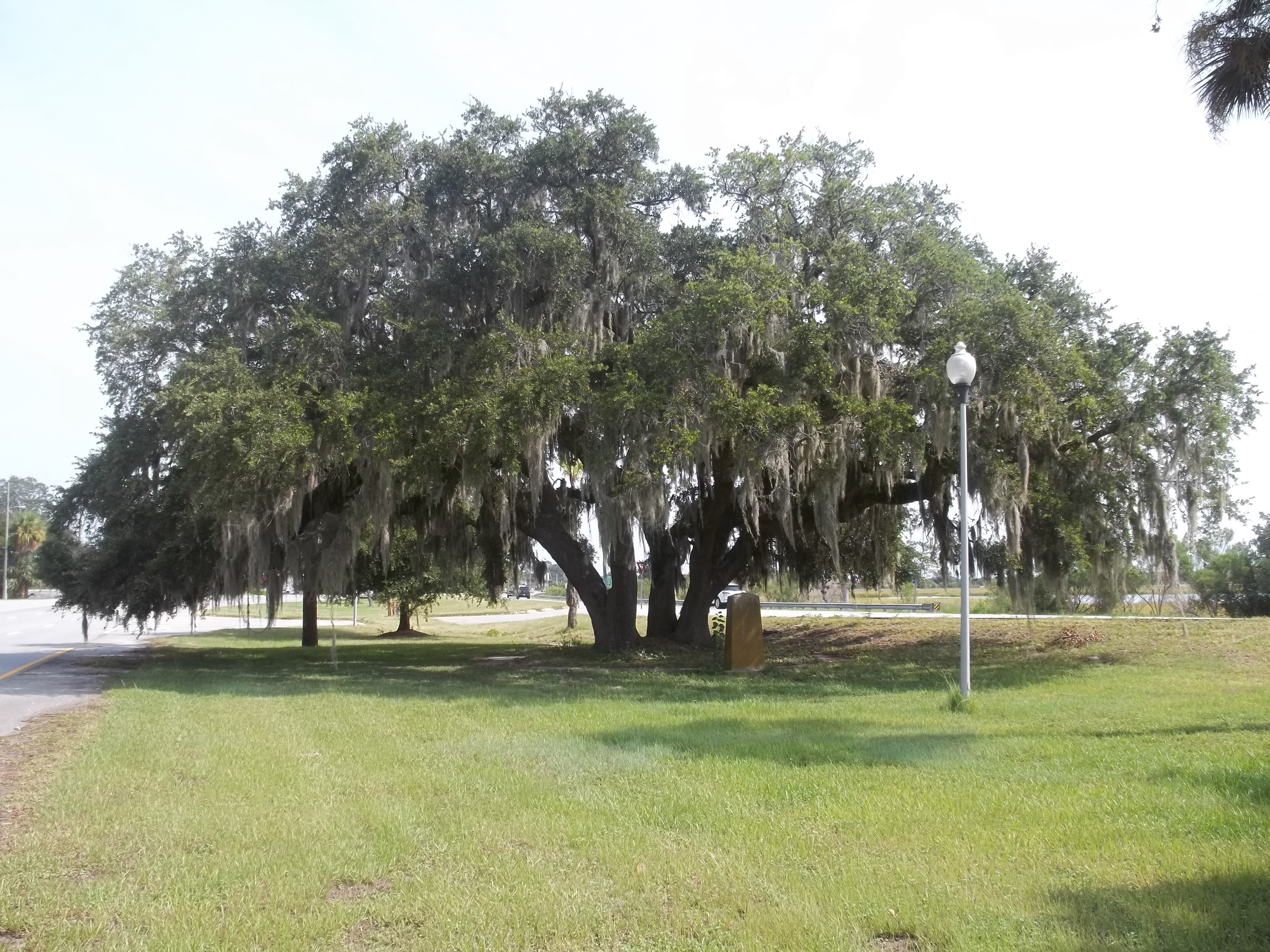 Brunswick, Georgia: Lanier Oak